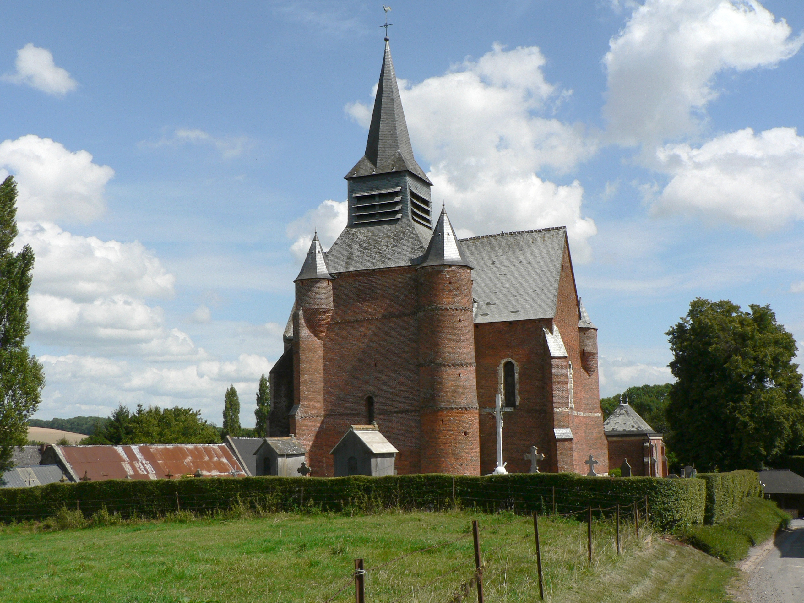 Église fortifiée de Burelles, Aisne, France